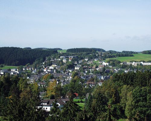 Marienheide, vom Aussichtsturm auf dem Eberg fotografiert